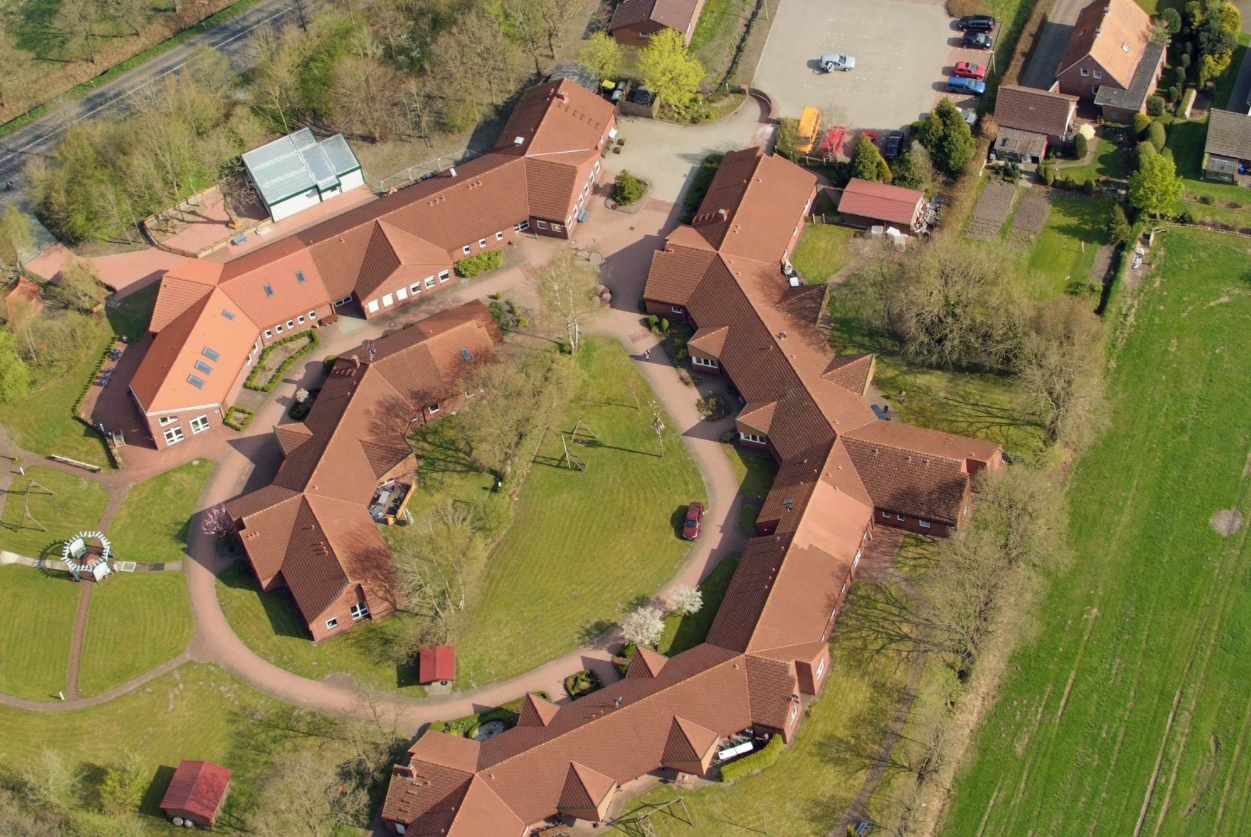 Behinderteneinrichtung "Lüttje Dörp" in Aurich-Kirchdorf